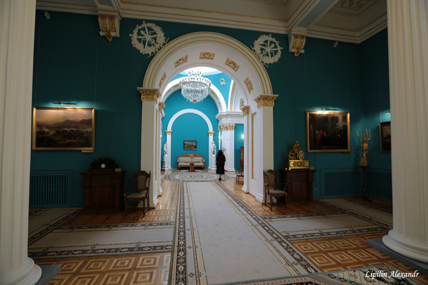 Гомельскі палацава-паркавы комплекс. Інтэр'ер